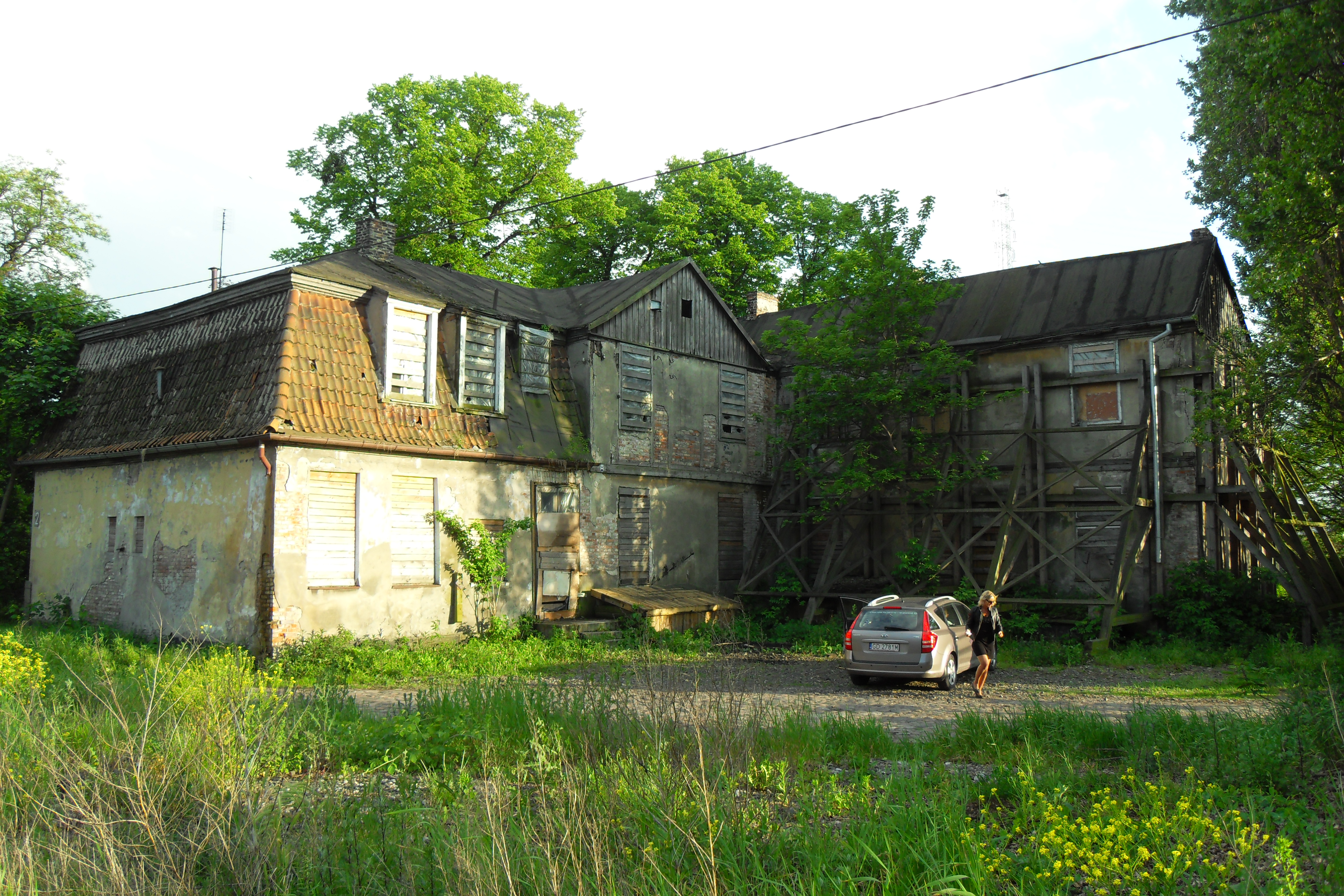 Gdańsk Nowy Port, ul. Starowiślna 2 i 2A.